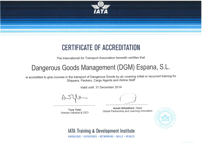 Premio otorgado a DGM por IATA.